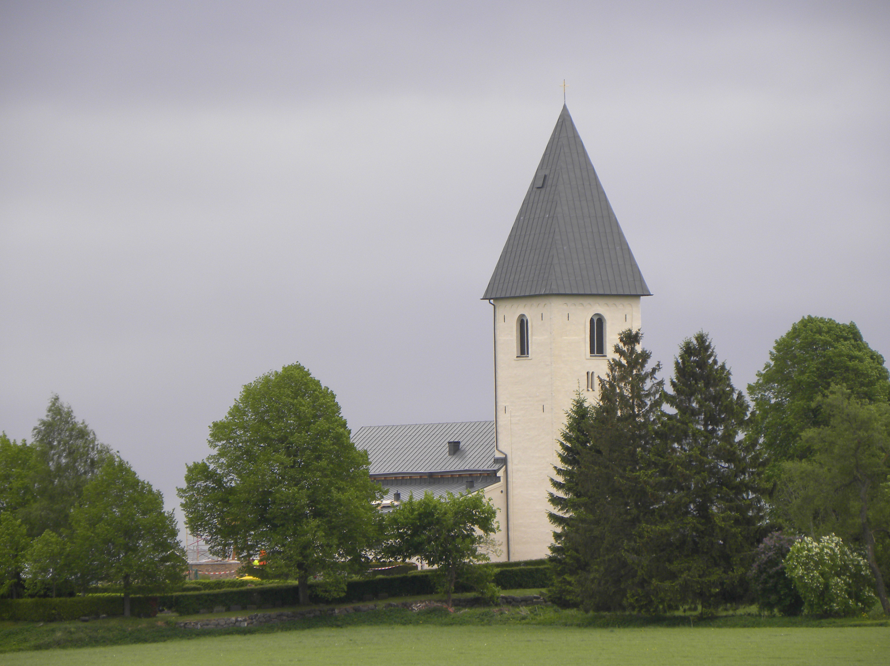 Älvestad kyrka med sitt nya utséende dagarna före återinvigningen.